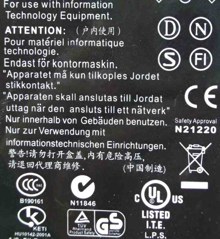 Produktkennzeichnung auf einem Netzteil eines Computermonitors, Symbole von oben nach unten: DEMKO, NEMKO, SEMKO, SETI, CE, WEEE, CCC, A-tick mark, UL, KETI, TÜV, GS